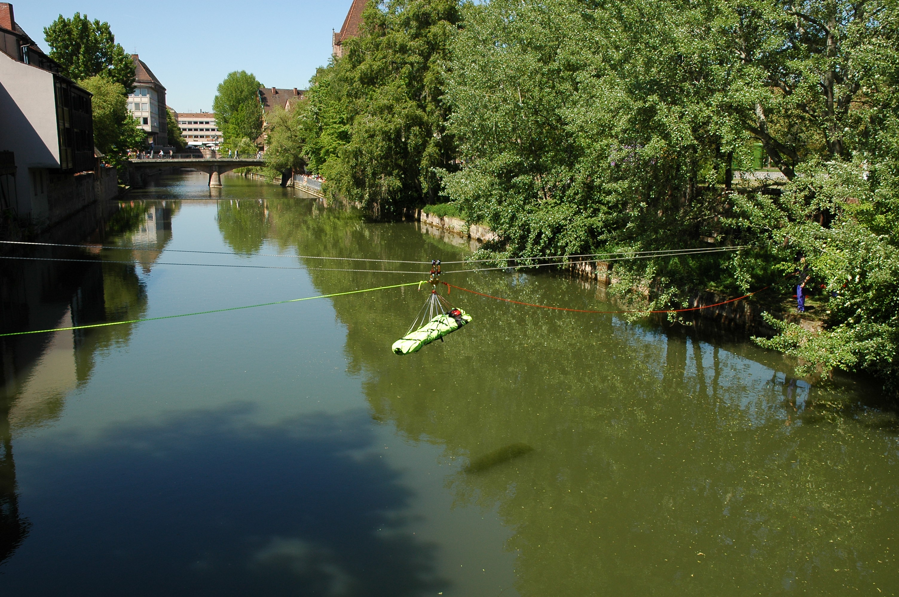 Seilrutsche über die Pegnitz. Demonstration durch die Bergwacht Nürnberg